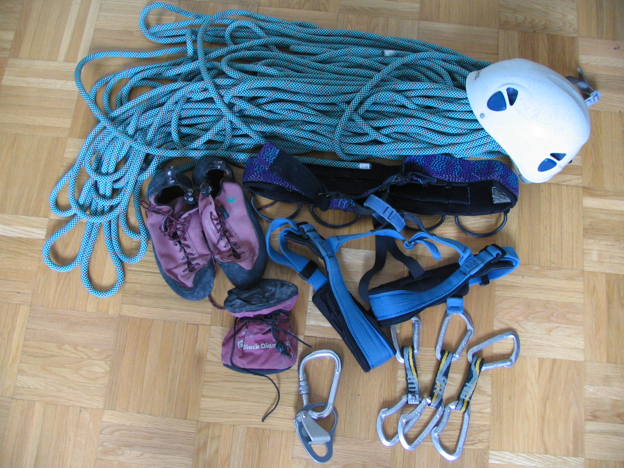 Equipment for sport climbing